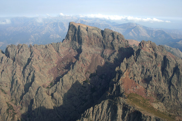 Photo aérienne de Paglia Orba Auteur : ceky Site internet : Paglia Orba